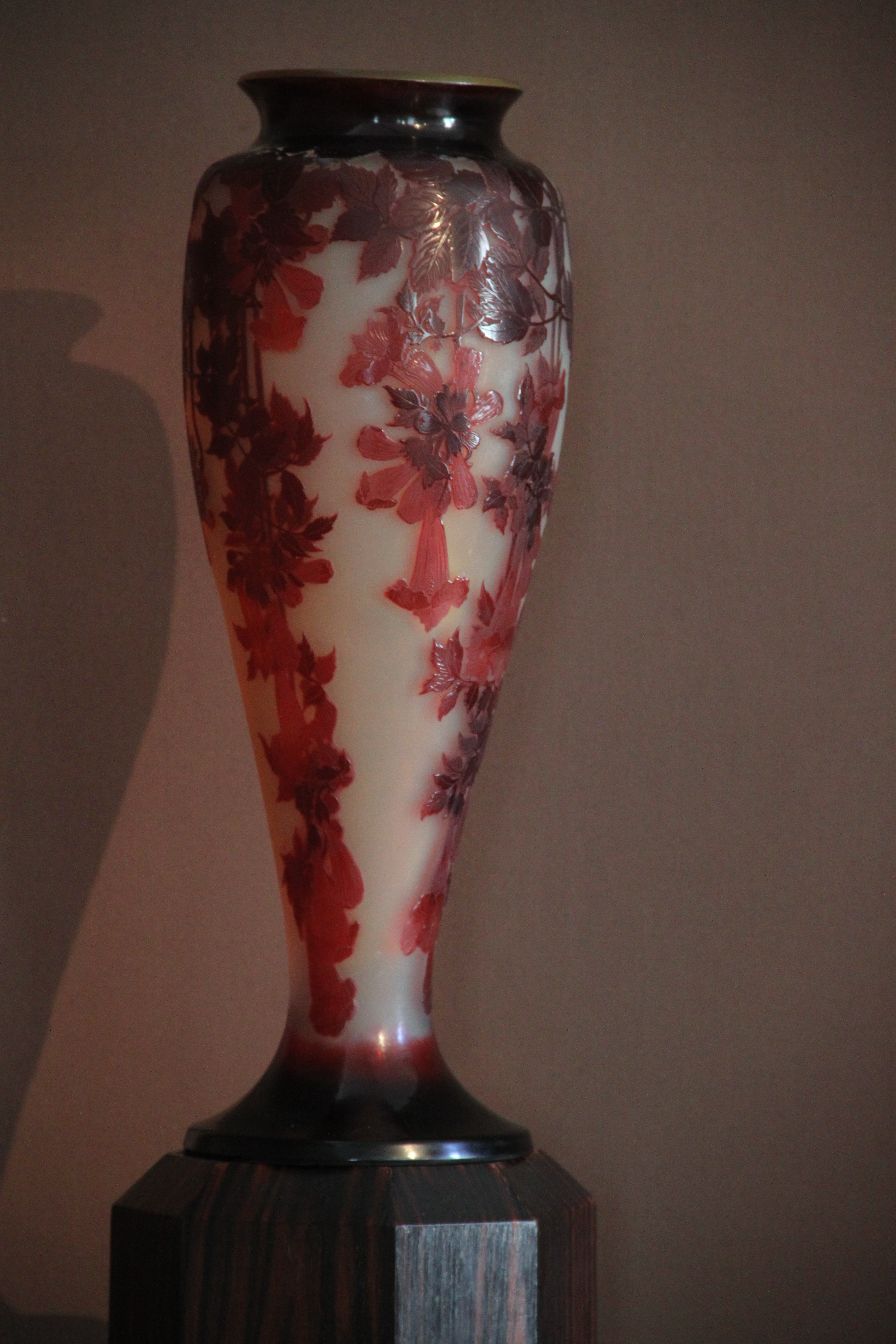 Emile Gallé Vase Bignonia, vers 1925 Signature en creux sur la pièce : Gallé Verre à plusieurs couches, gravure Don, 2001 (invv. 001.4.1)